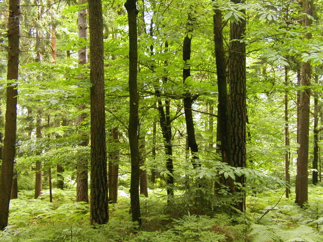 3314 Zgornje Gorče, Slovenia